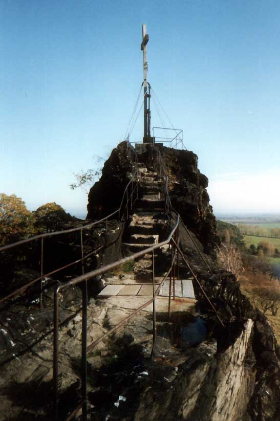 Gipfelkreuz auf dem Großen Gegenstein bei Ballenstedt